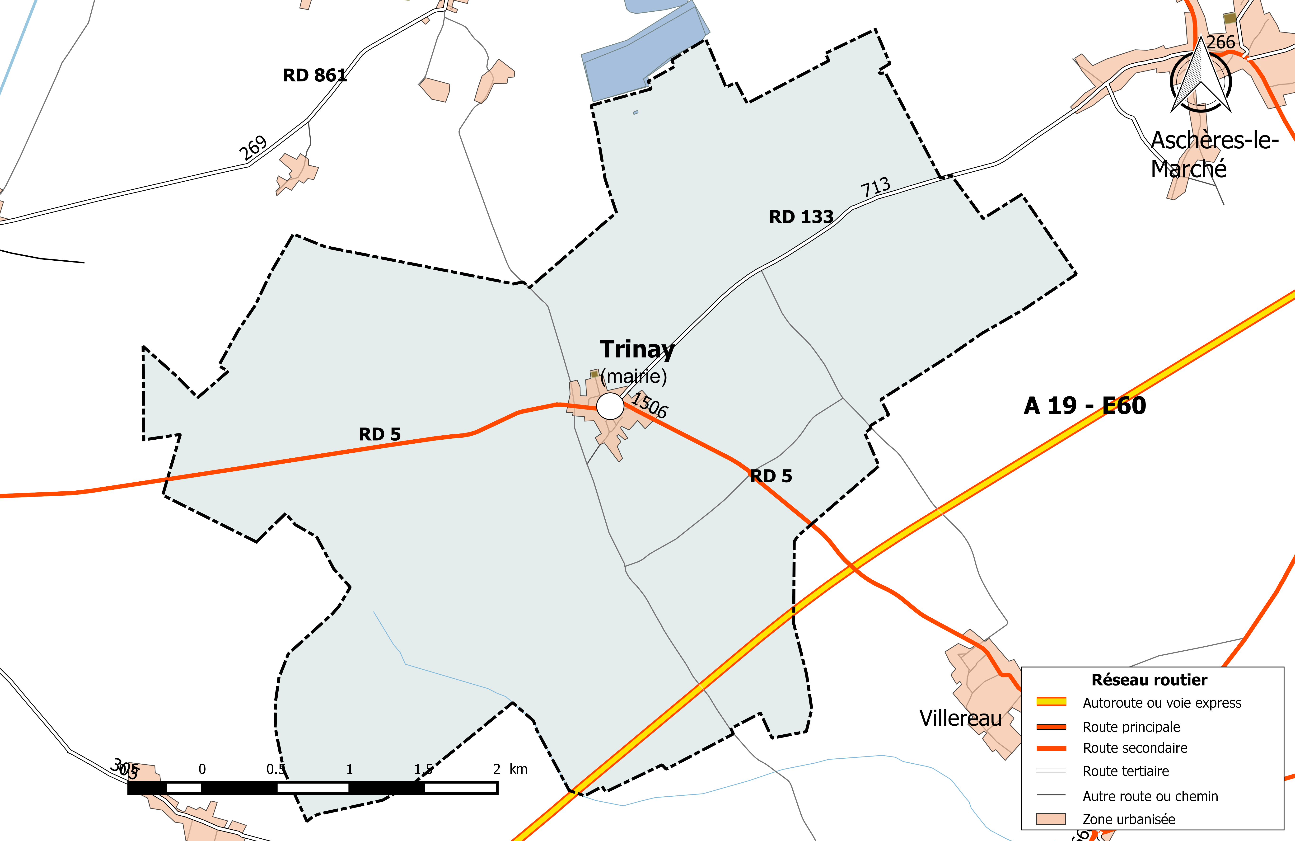 Carte du réseau routier de la commune de Trinay.